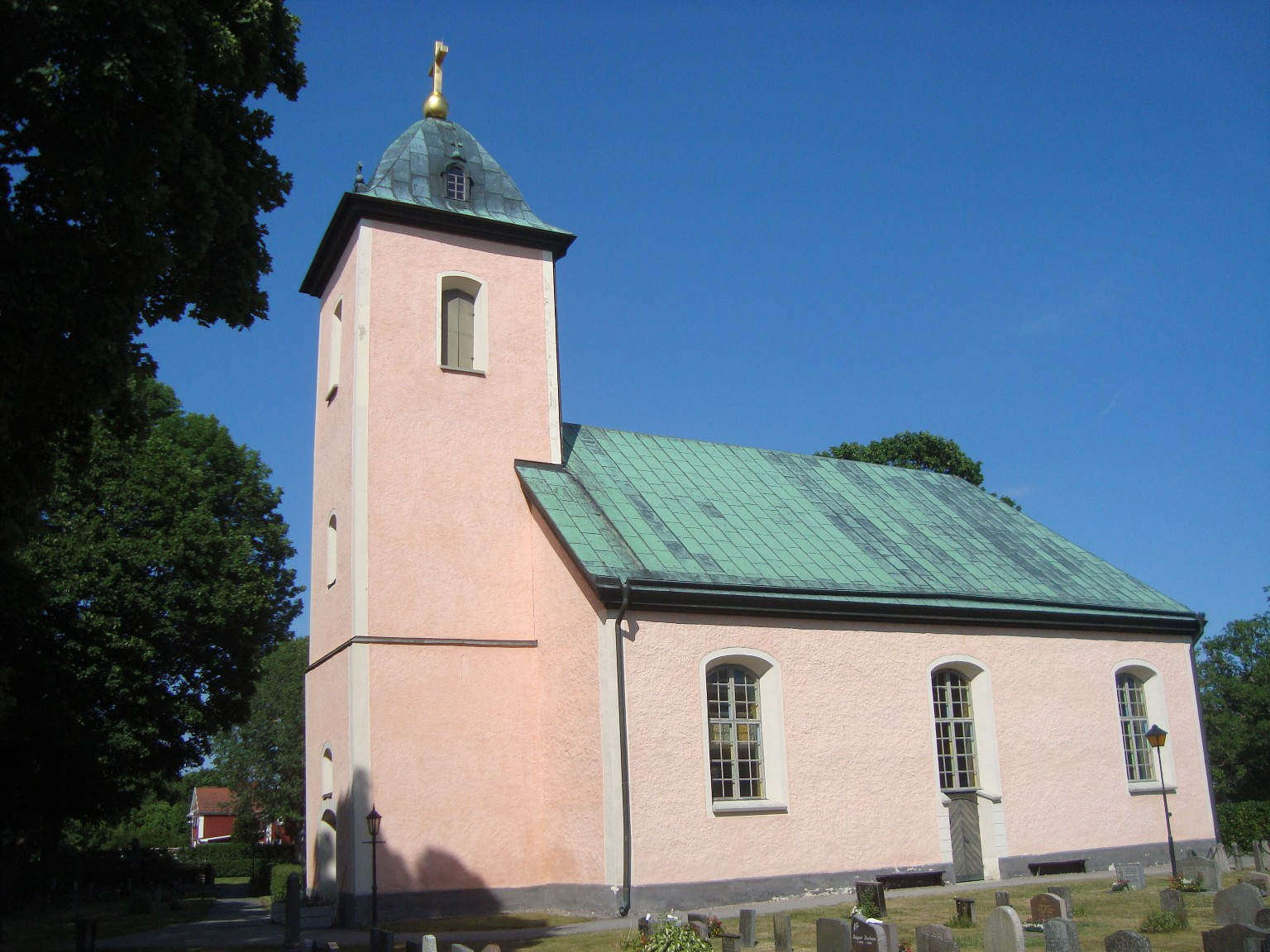 Lännäs kyrka, Närke